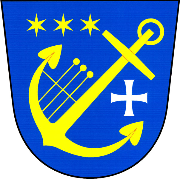 Znak obce Obříství